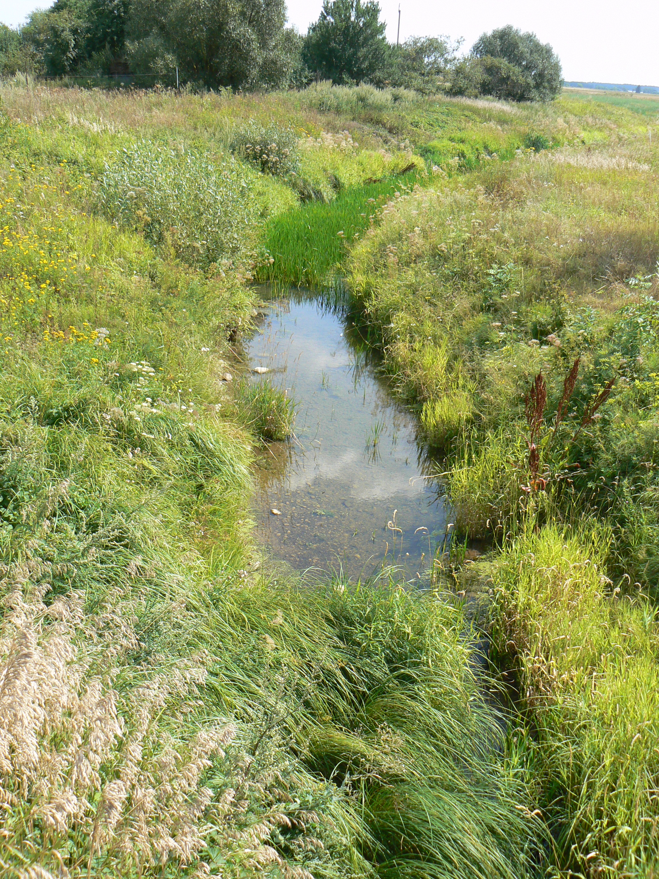 Střední tok řeky Baukštė ve vsi Baukštininkai. Pohled z mostu silnice č. 217 Klemiškė I - Plikiai - Jokūbavas proti proudu, t. j. k jihovýchoduLietuvių: Baukštė Baukštininkuose.